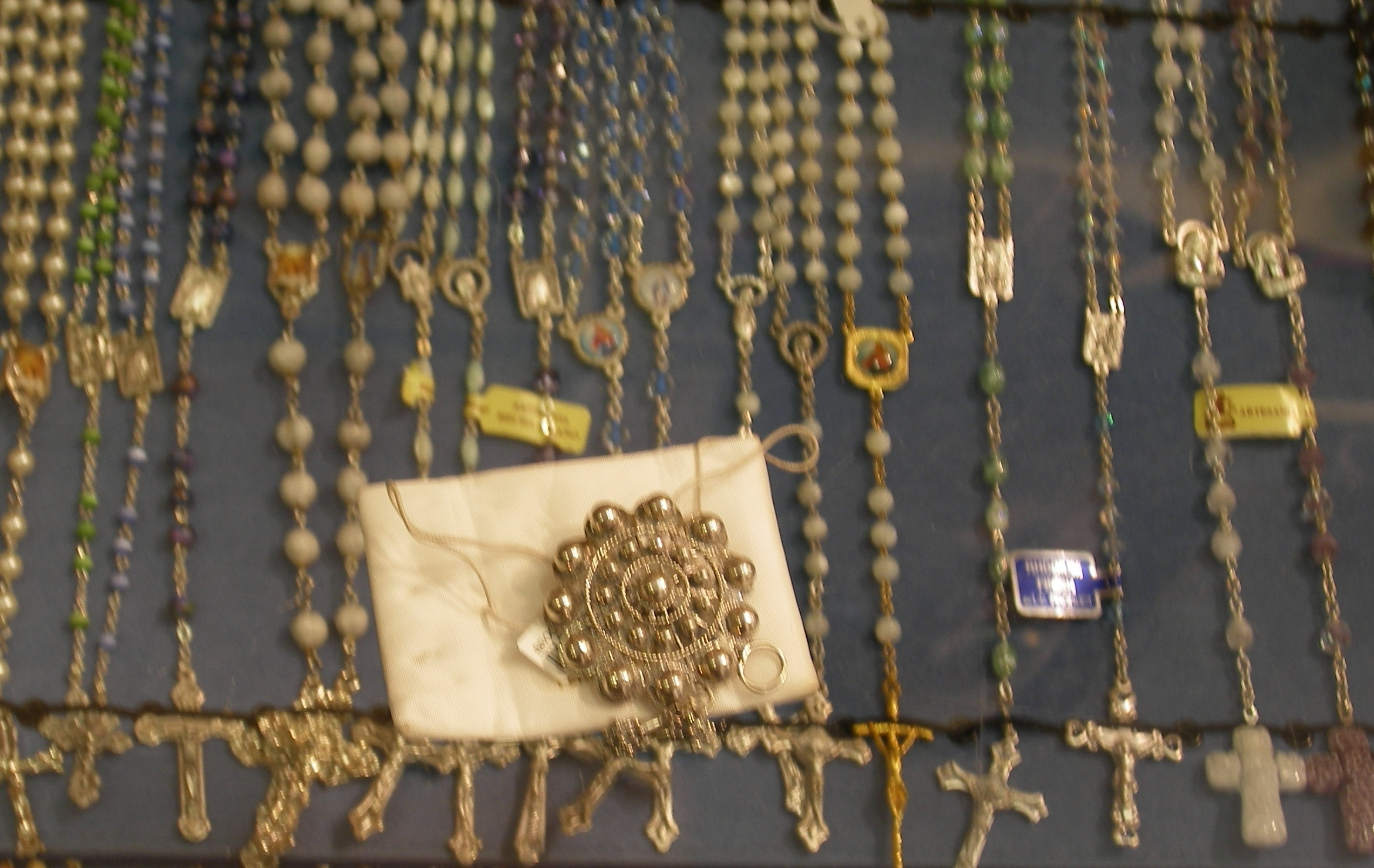 Fotografía de un botón charro del folclore Salamanca (España) realizada en una joyería de la localidad